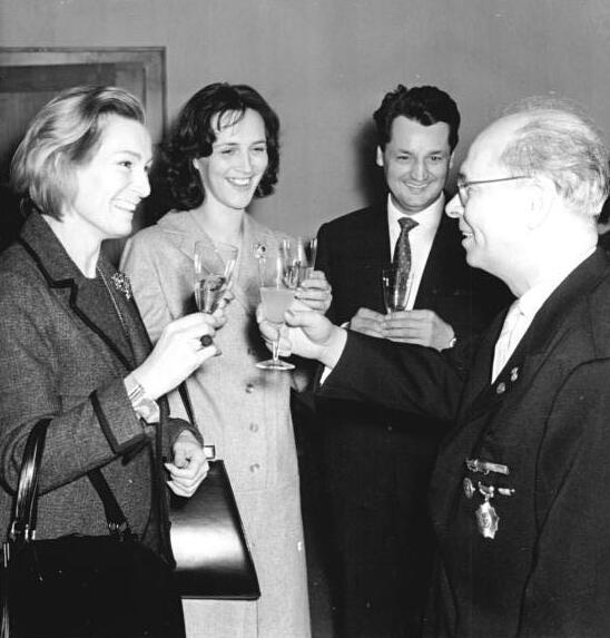 Zentralbild-Hesse 14.2.1962 Gratulationscour zum 60. Geburtstag Alexander Abuschs. Führende Persönlichkeiten des politischen und kulturellen Lebens der DDR beglückwünschten Alexander Abusch, Stellvertreter des Vorsitzenden des Ministerrates und Mitglied des ZK der SED, am Mittwoch, dem 14.2.62, zu seinem 60. Geburtstag. UBz.: Unter den Gratulanten waren auch so bekannte Schauspieler wie Inge Keller, Irma Münch und Horst Drinda (v.l.n.r.)